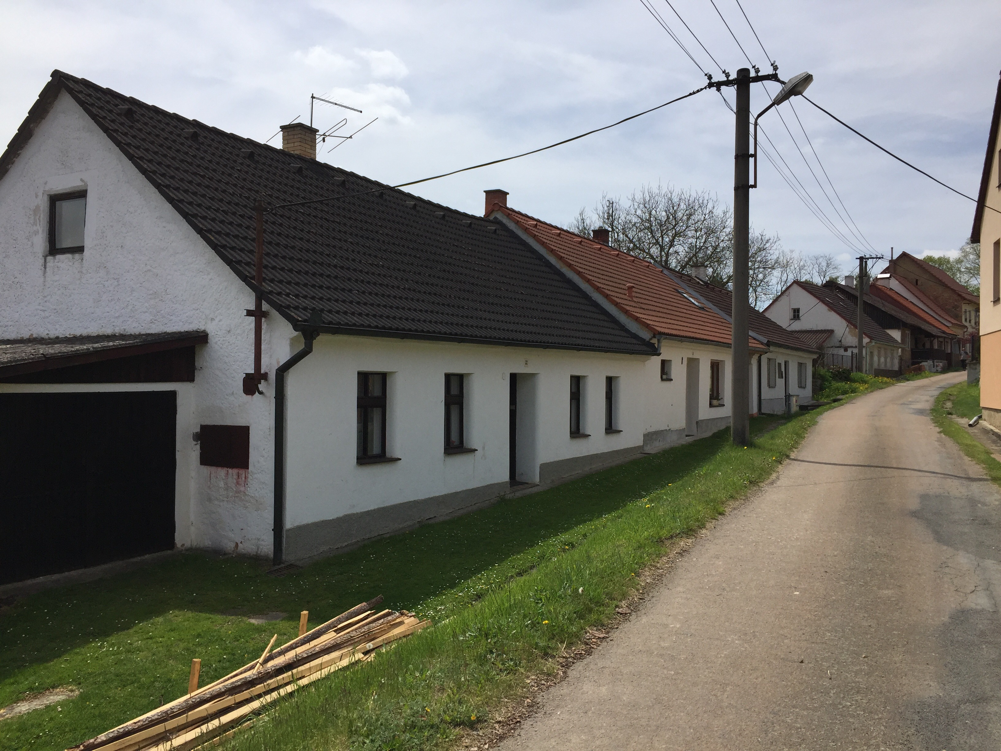 Horní část bývalé židovské ulice (ghetta), zvané Karlín, v Hřešihlavech, foto jaro 2017. V domě čp. 3 byla koncem r. 2017 během rekonstrukce objevena předpokládaná rituální lázeň mikve.